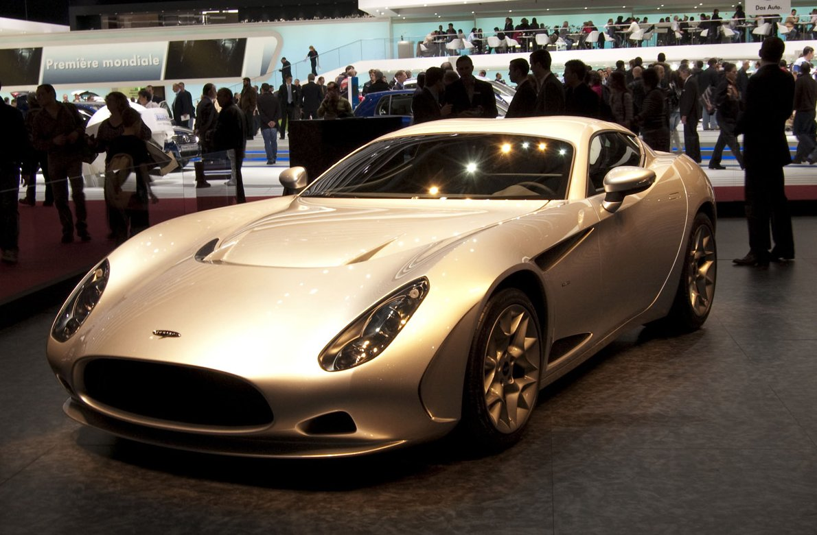 Perana Z-One (modèle de production en el Salón de Ginebra 2009)